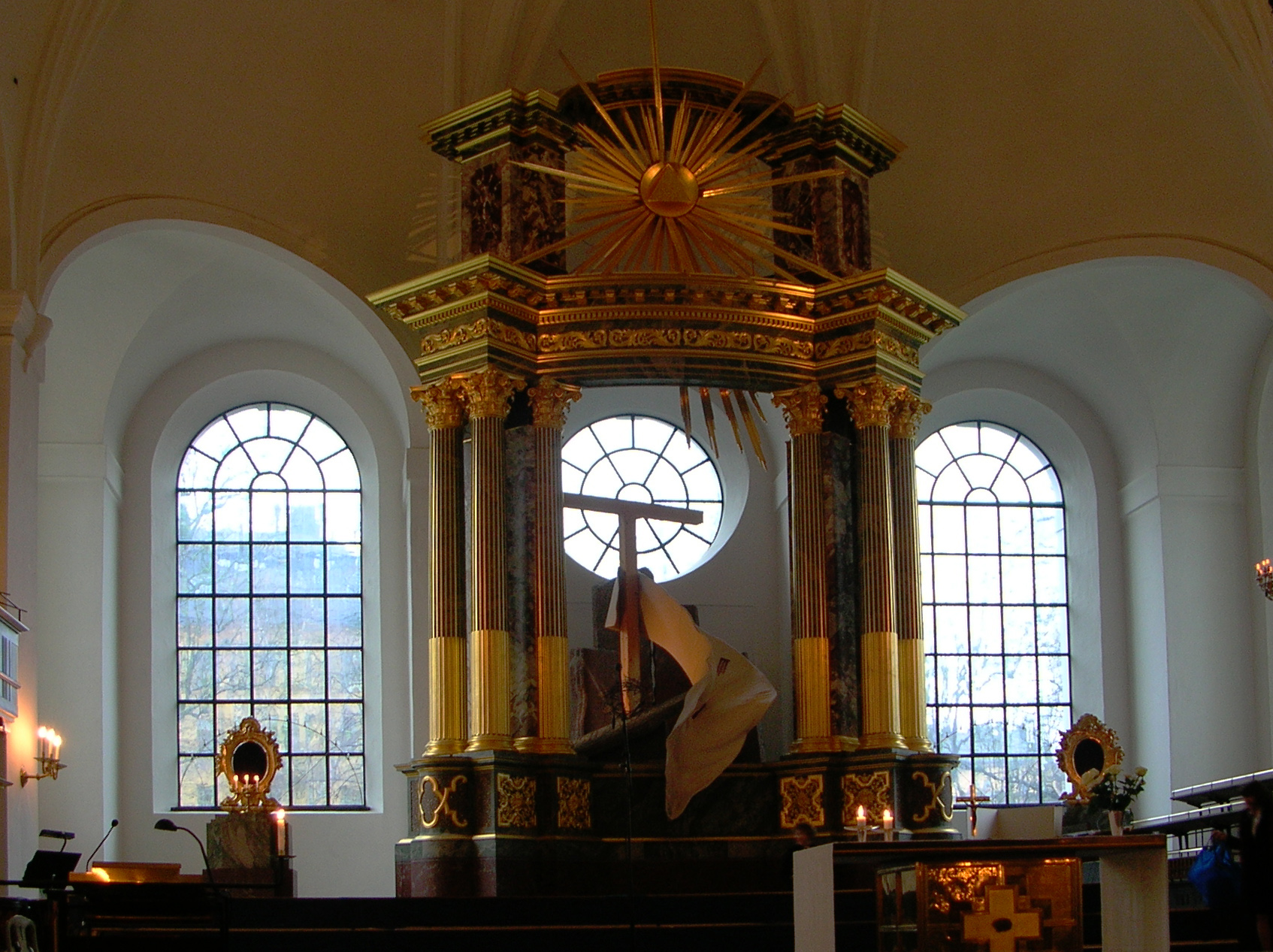 Katarinakyrkan, Stockholm, Sweden. New altar.